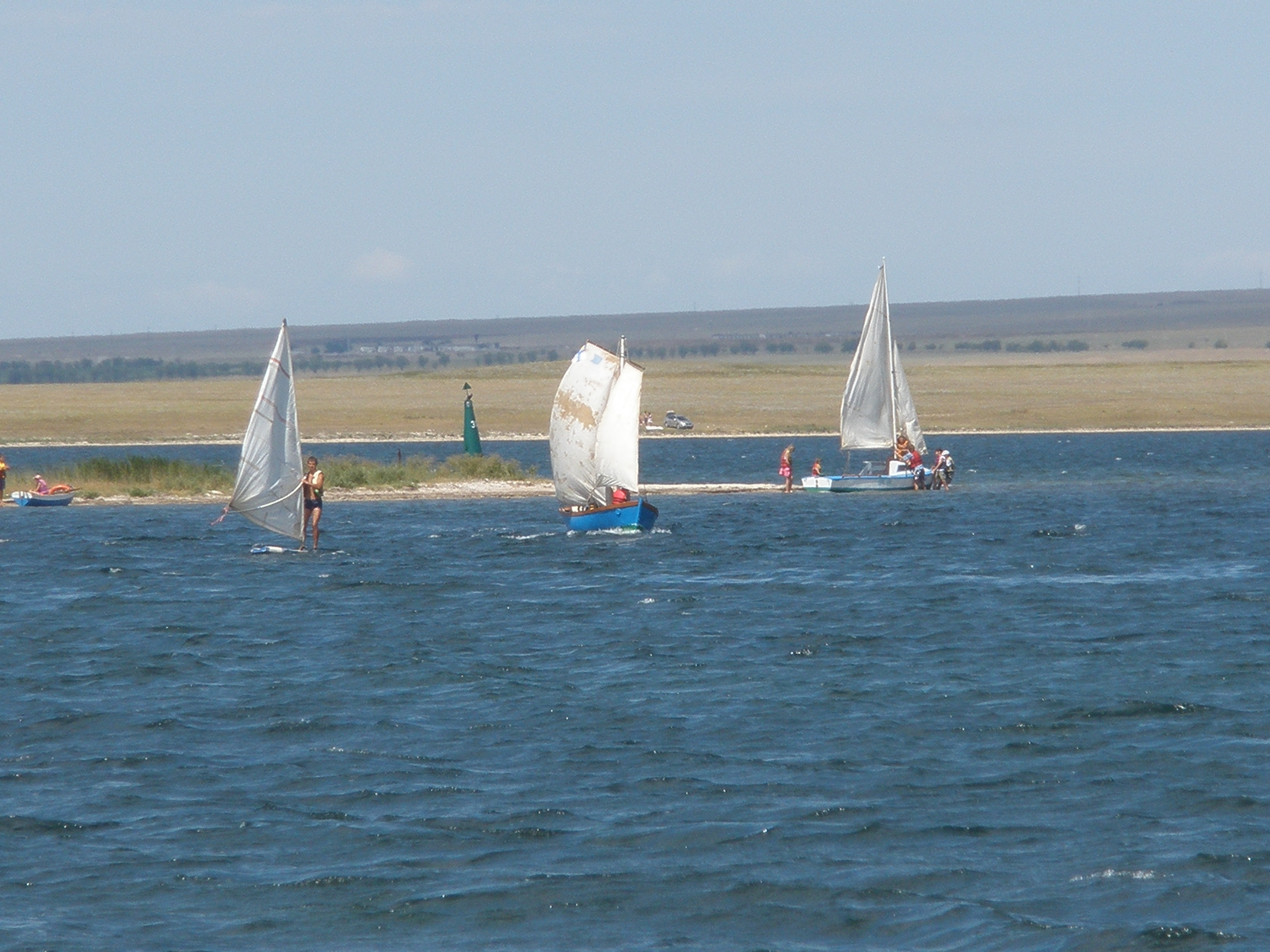 Парусный спорт в Новоозёрном